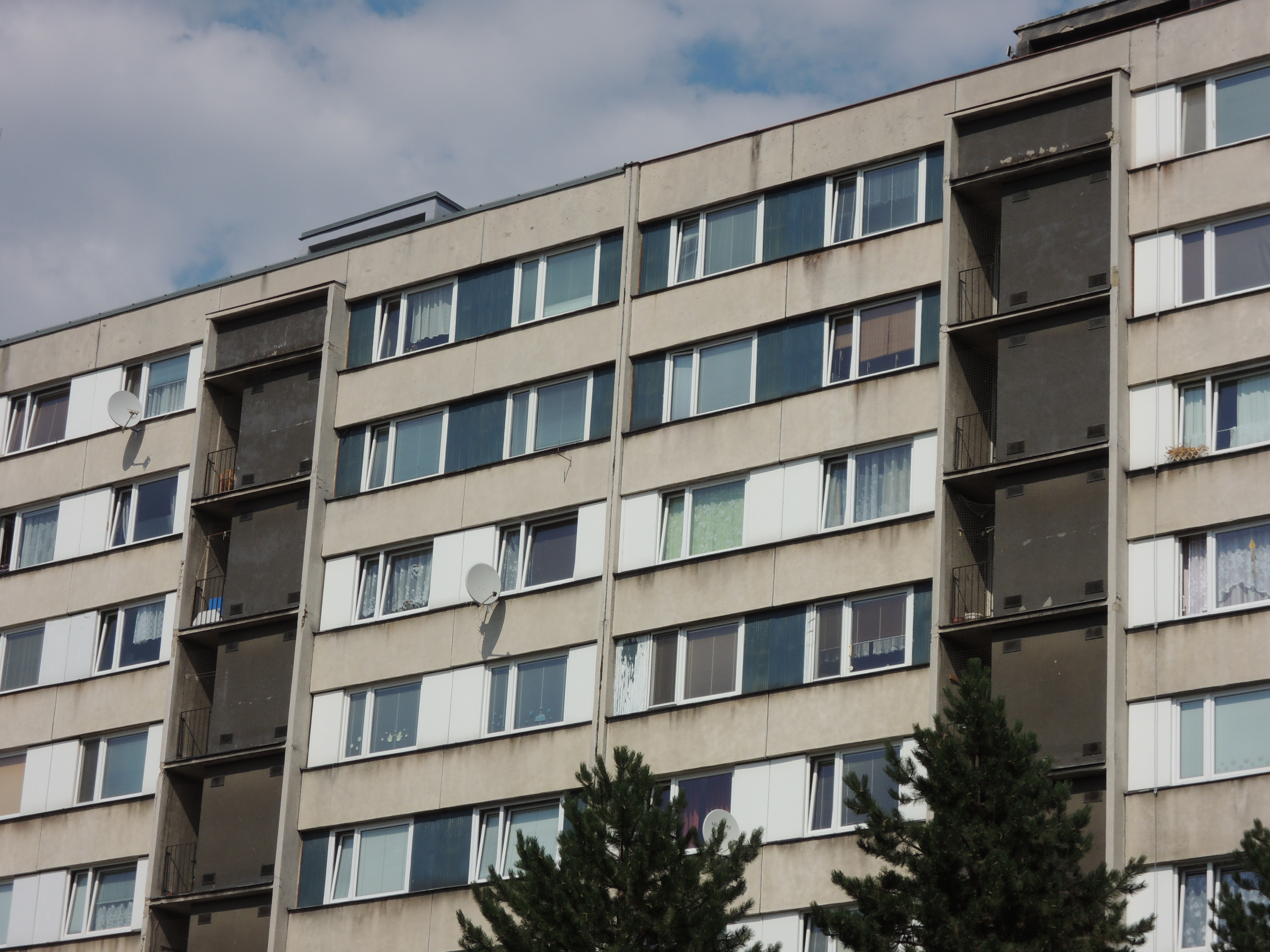 Pohled na nezrekonstruovaný panelovým dům na Severní Terase. Původní jsou modré plechové meziokenní vložky.